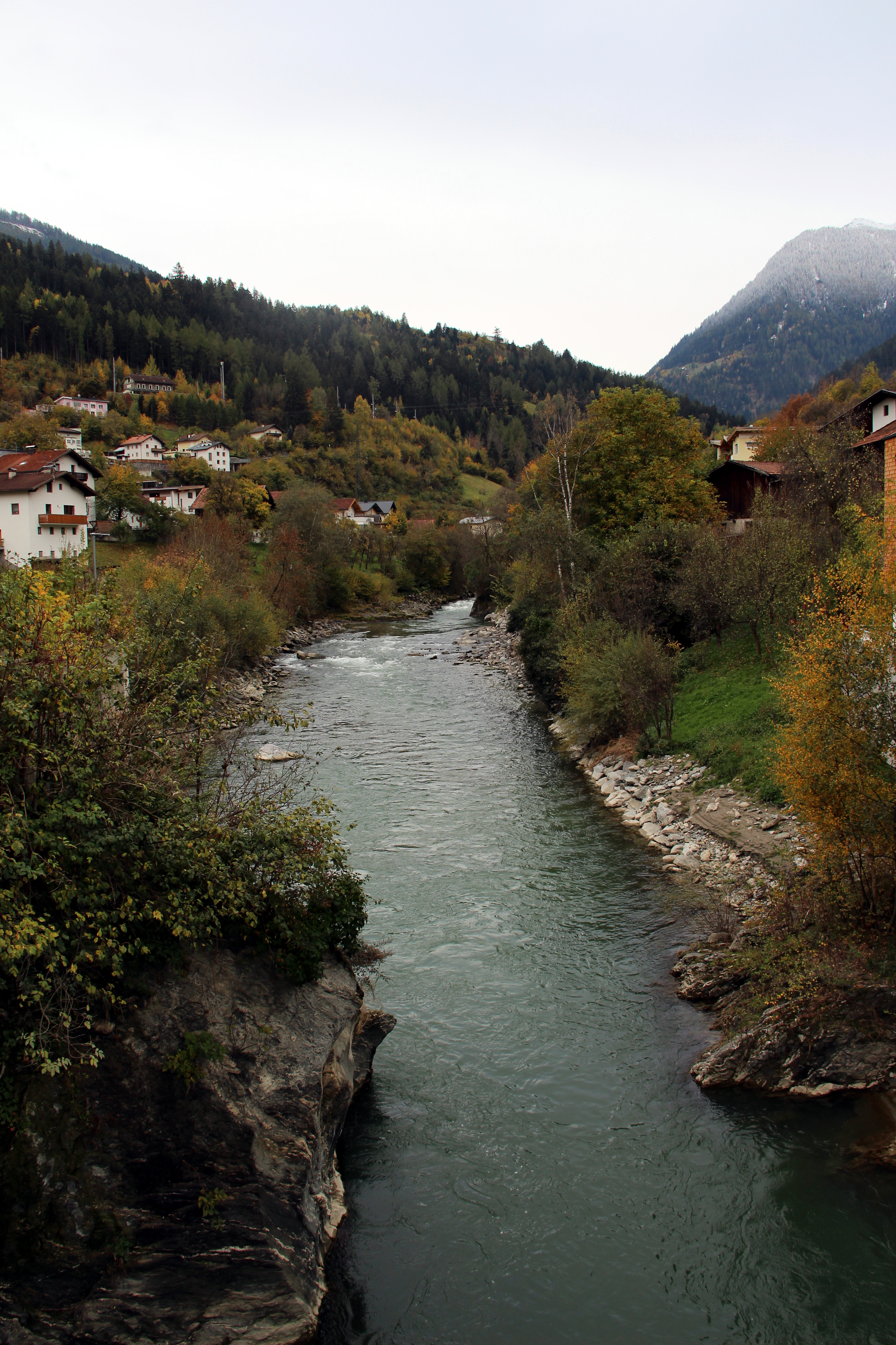 Die Sanna im Ortszentrum von Pians